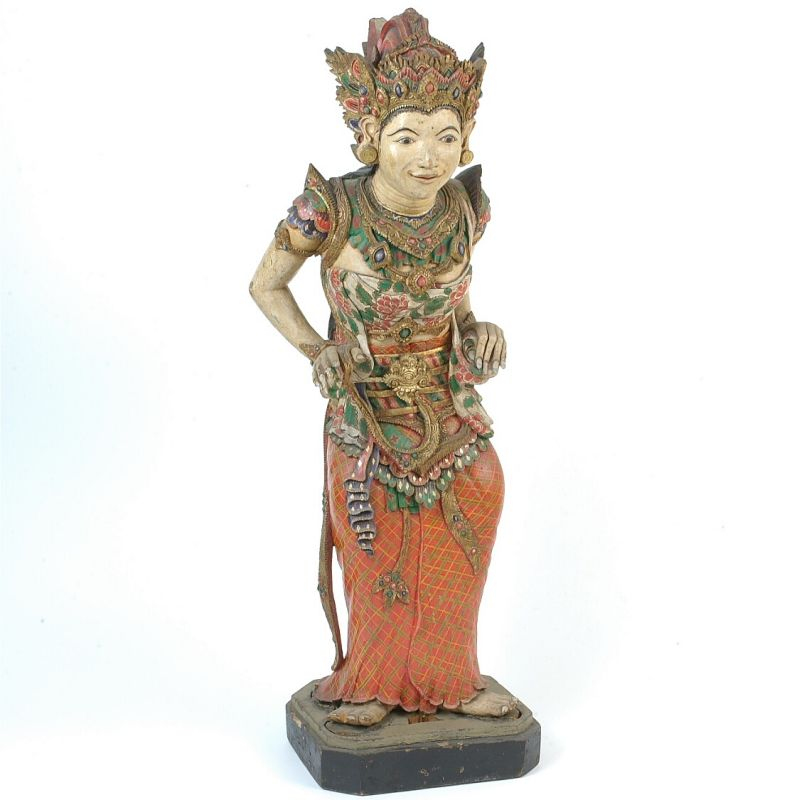 Beeld. Rati is de gemalin van de liefdesgod Kama, die onder de namen Ratih en Imara bij de Baliers bekend staat en ongeveer op dezelfde wijze gedacht wordt als de schone prinsen en prinsessen uit de romatische verhalen die, evenals zij, worden uitgebeeld met de blauw-gele huidskleur, loshangende haren, gouden oorknoppen, met edelstenen bezette pols- bovenarmbanden. Behalve de kemben (heupdoek), die door de buikband wordt vastgebonden, draagt Ratih de bapang, een kleedje dat in twee kragen van de schouders op de bovenarmen afhangt. Deze godin van de liefde stelt men zich eigenlijk niet anders voor dan een Balinese danseres. De vervaardiger heeft getracht dit beeld een sensuele uitdrukking te geven. Intussen blijkt uit de rijke hoofdbedekking, de versierselen boven de schouders en de met edelstenen bezette banden om de kleren, het hemelse karakter van deze liefdesgodin. Dit beeld behoort tot een groep van 28 beelden (15-156 t/m 15-182b), gezamenlijk een pantheon van Balinese godheden vormend, dat getoond werd op de Nederlandse koloniale afdeling op de wereldtentoonstelling te Parijs in 1900. Speciaal voor deze tentoonstelling heeft C.M. Pleyte, conservator van 's Rijks Etnografisch Museum in Leiden, deze beelden op Bali laten vervaardigen. Met behulp van enkele priesters selecteerde hij de relevante beelden die vervolgens door Balinese houtsnijders werden nagemaakt. . Houten beeld van de godin Rati